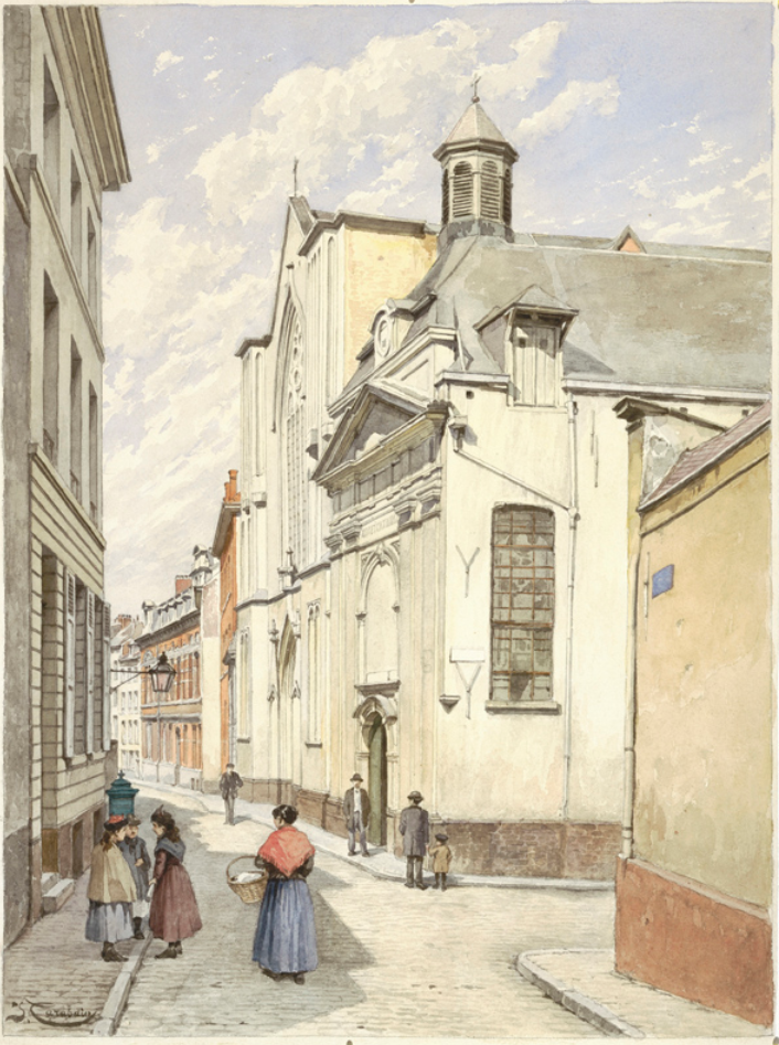 Aquarel van Jacques Carabain uit reeks over Brussel: Stuiverstraat richting Kantersteen